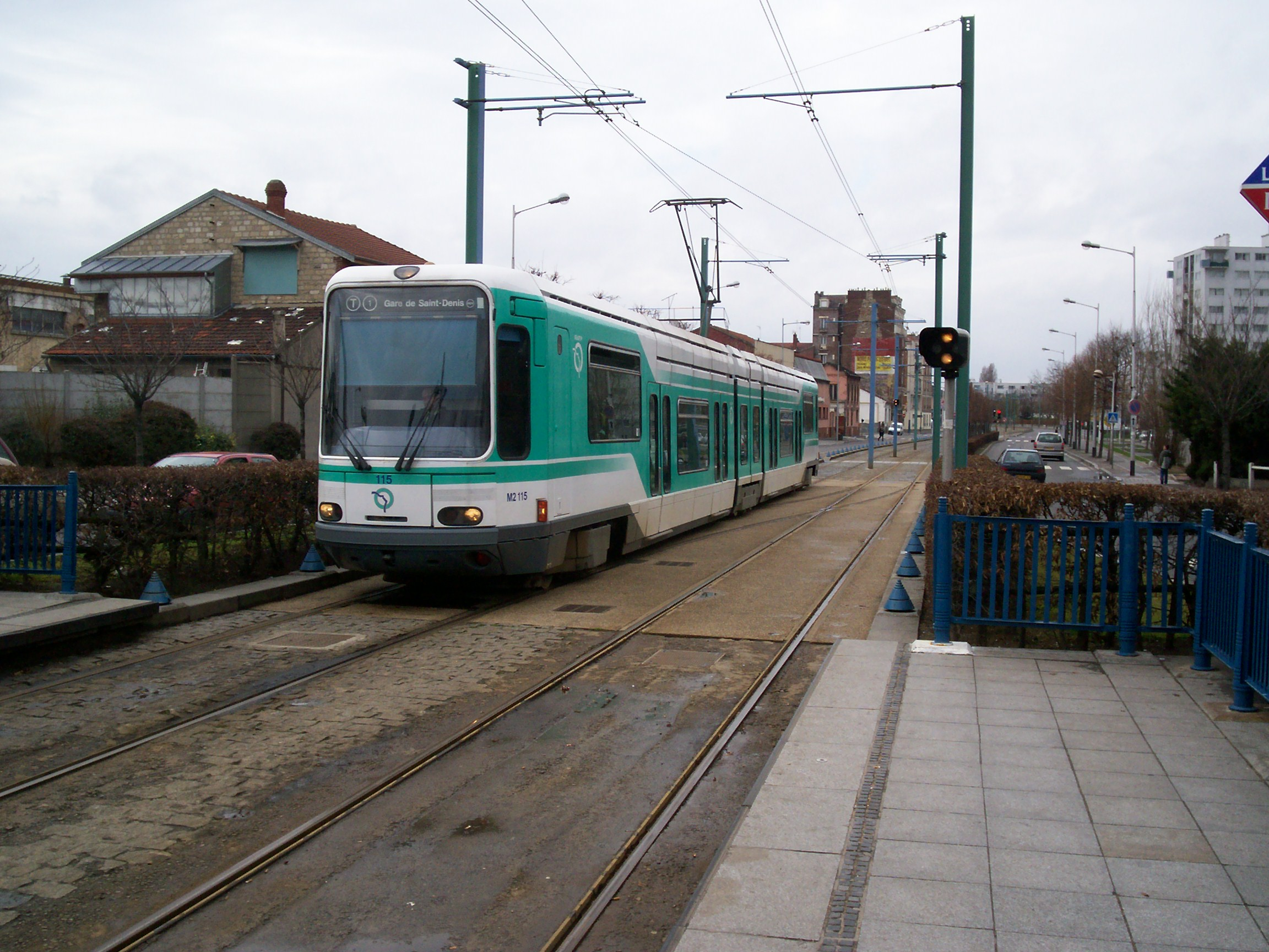 T1 à La Courneuve Six Routes